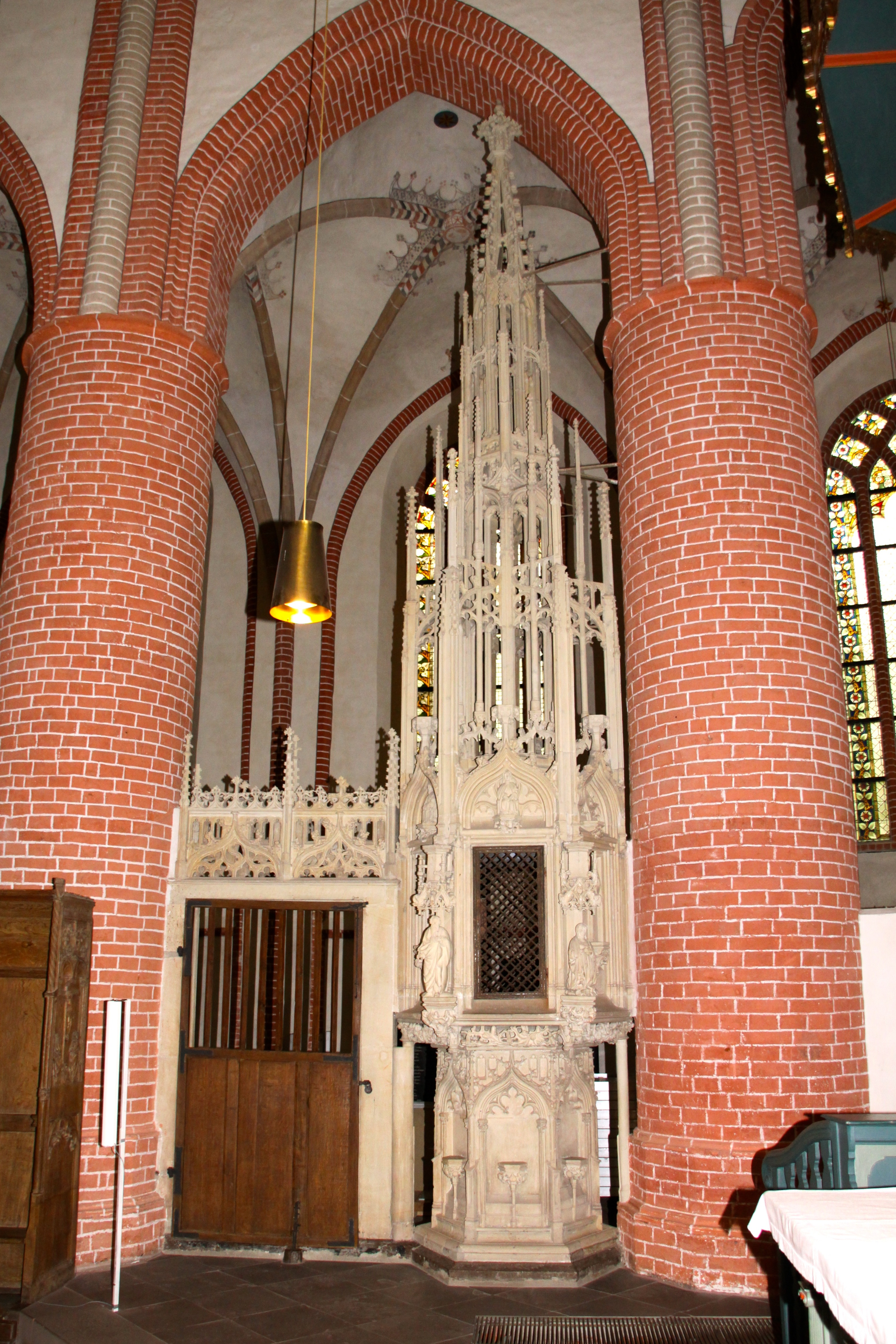 Sakramentshaus der Ludgerikirche